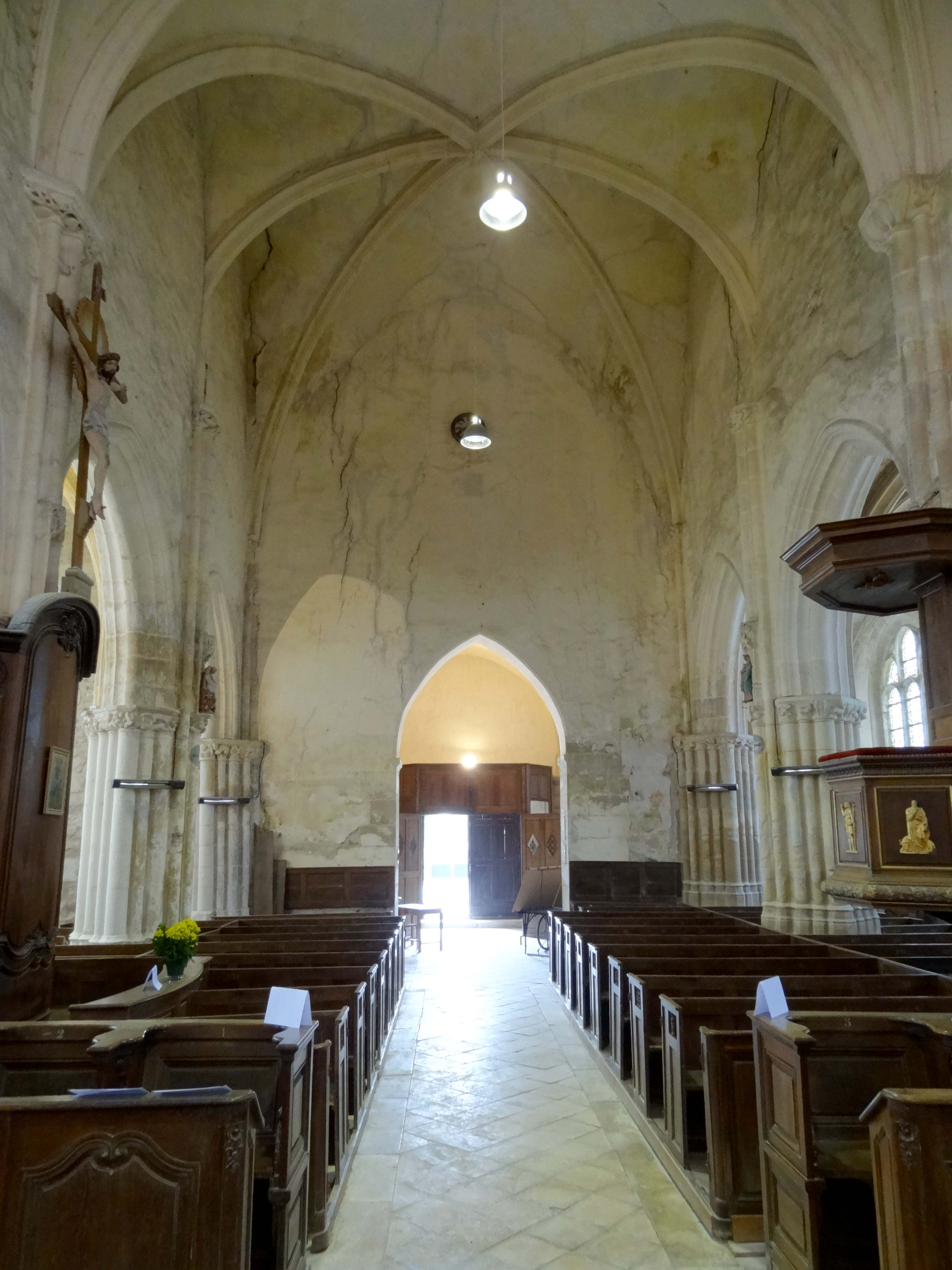 Intérieur de l'église - voir titre.